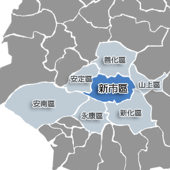 新市區相對位置